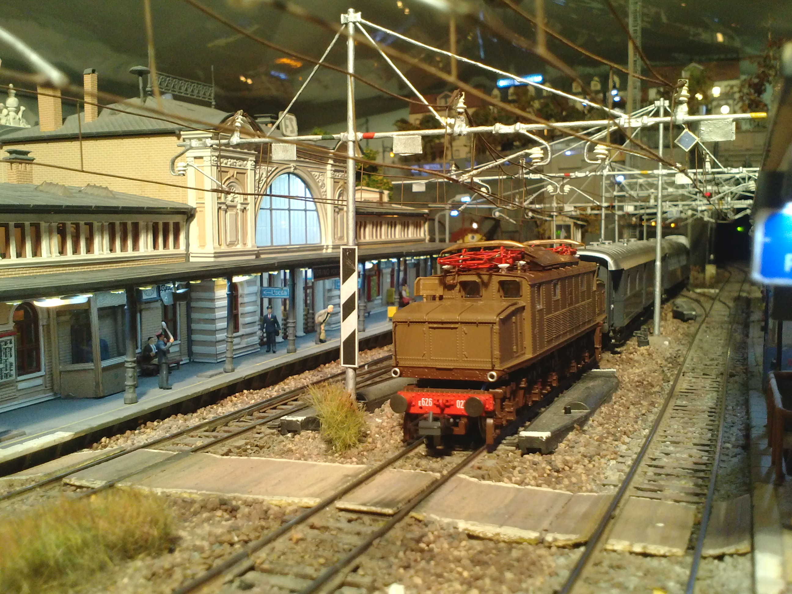 Scorcio di un plastico ferroviario privato